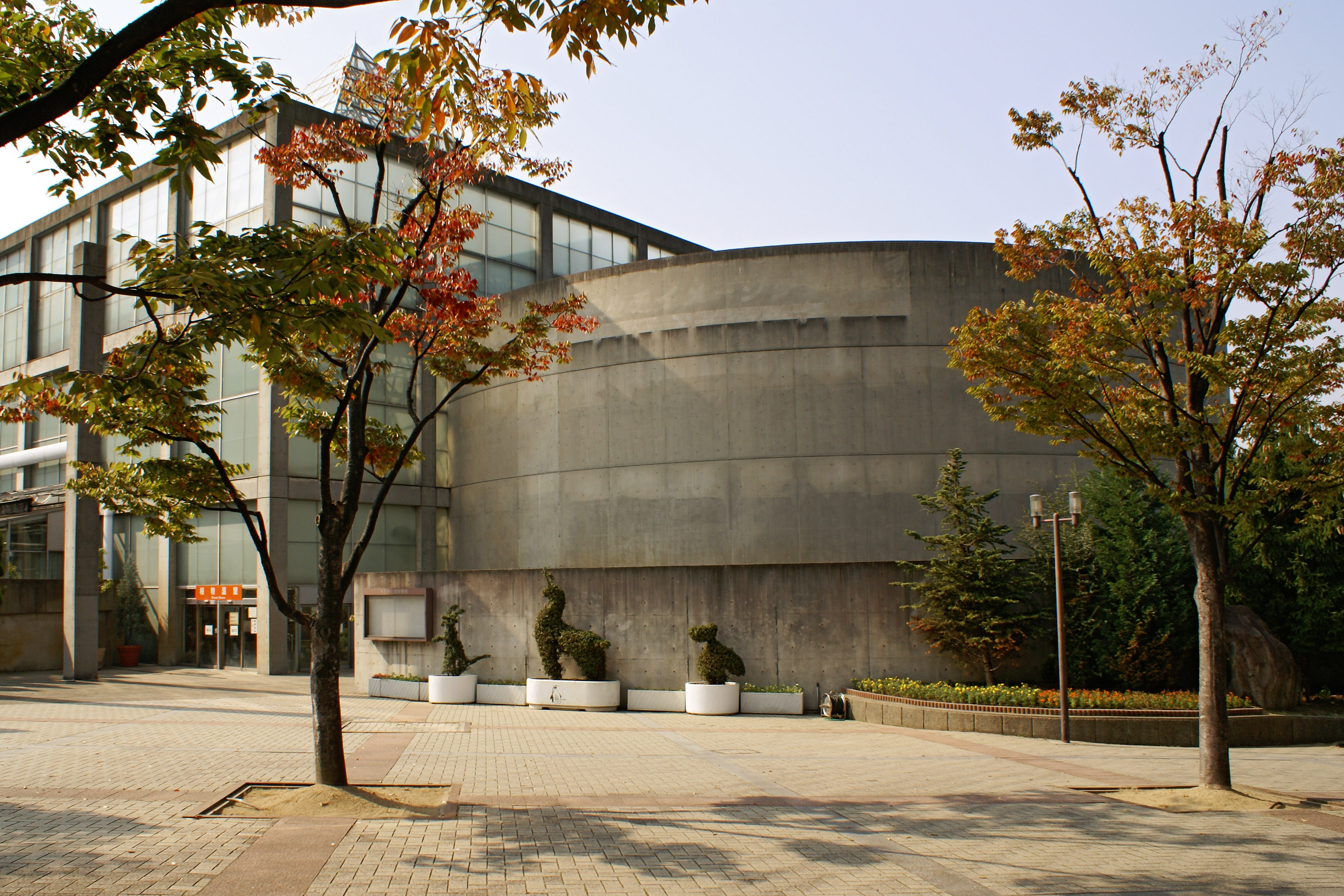 Tennoji Park in Osaka, Osaka prefecture, Japan